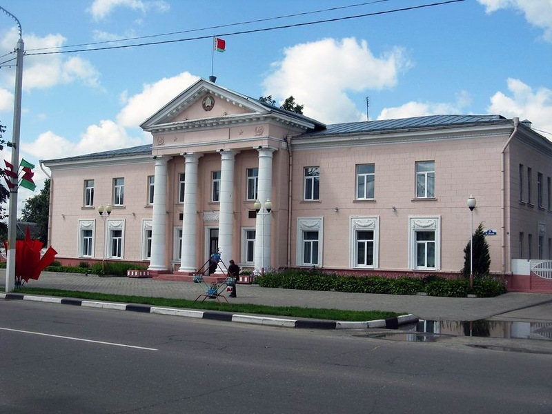 Быхов. Административное здание на улице Ленина